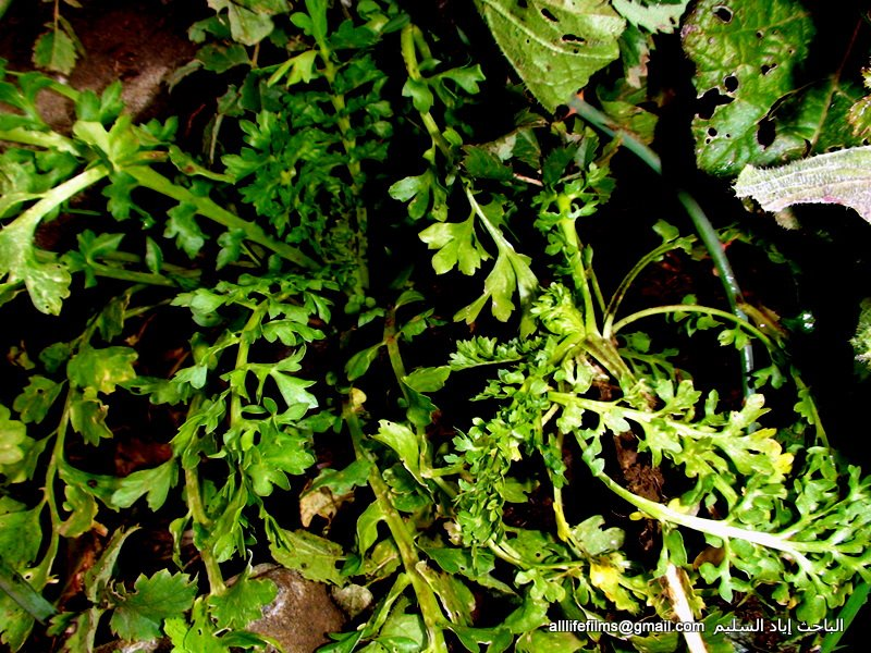 نباتات برّية سورية تؤكل